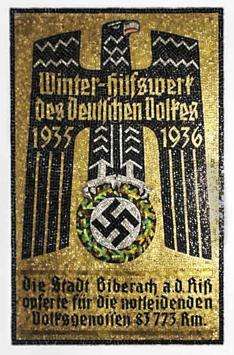 Gedenktafel für das Winterhilfswerk, Exponat aus dem Braith-Mali-Museum in Biberach an der Riß. Mosaik, Eisen und Blech. 1935/36. Ausführung: Aug. Wagner, Berlin-Treptow